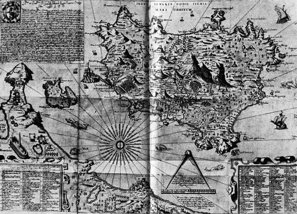 Carta dell'isola d'Ischia disegnata da Mario Cartaro (1586) – (Dalla prima edizione del De’ rimedi naturali)